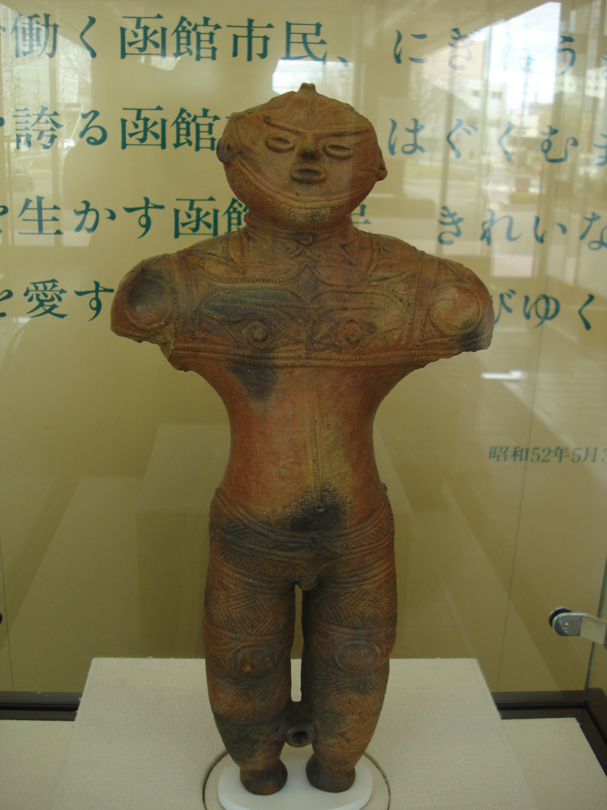 中空土偶カックウ複製